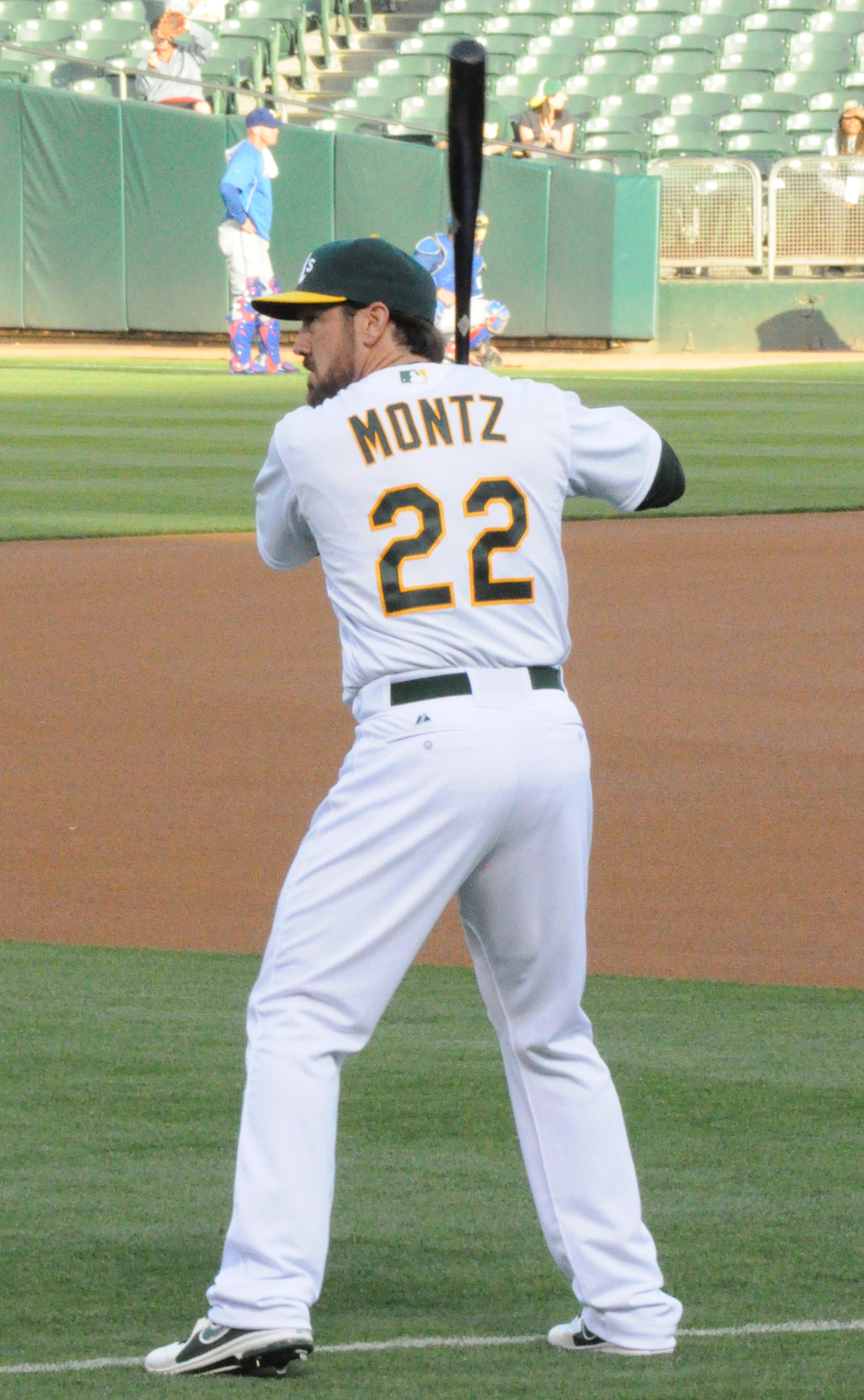 Luke Montz